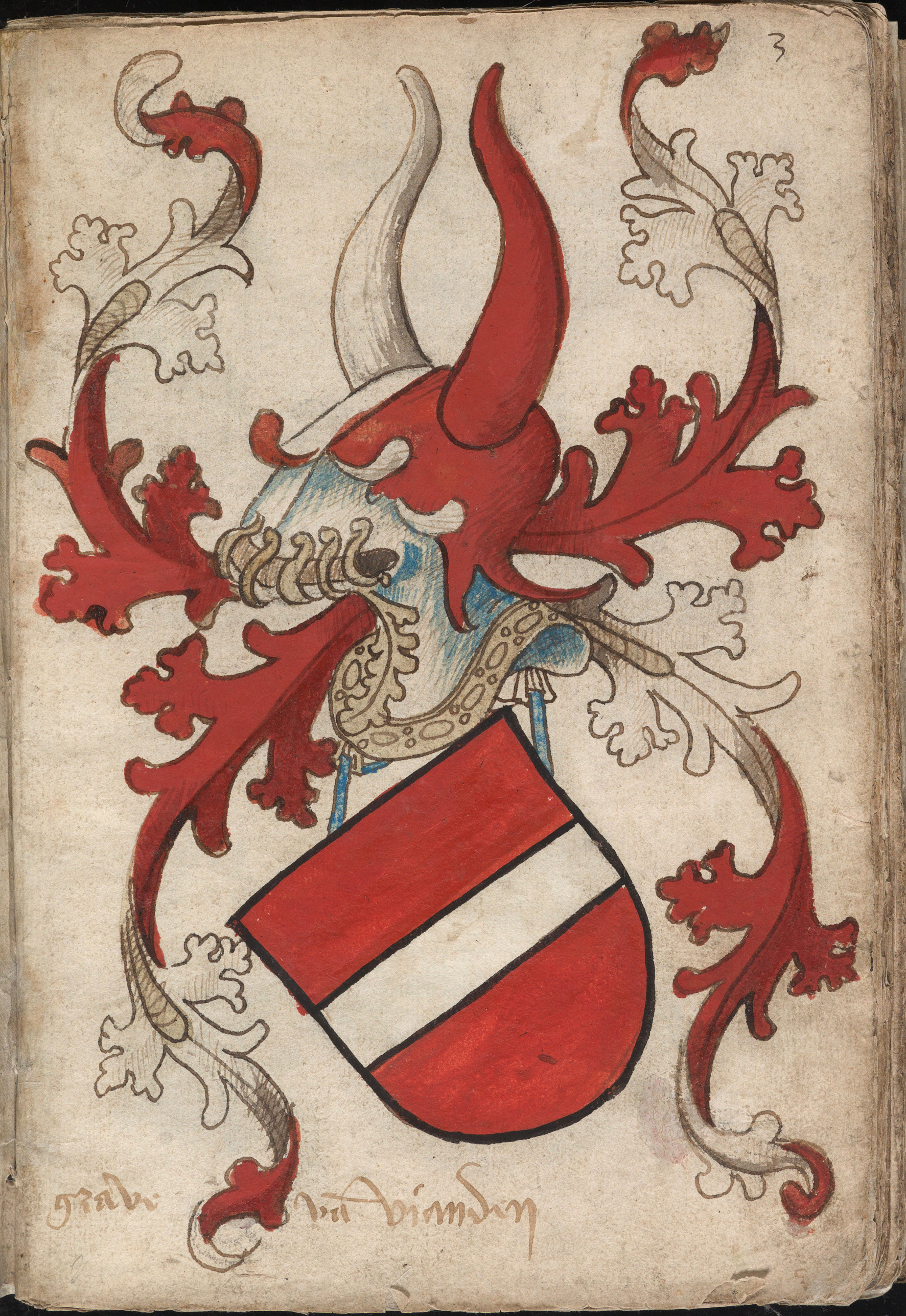 Het graafschap Vianden kwam in 1417 door vererving in handen van Engelbrecht I van Nassau (ca. 1370-1442), de grootvader van Engelbrecht II. Diens grootvader, Otto II van Nassau-Dillenburg (ca. 1305-1351), was getrouwd met Adelheid van Vianden (ca. 1307-1376).